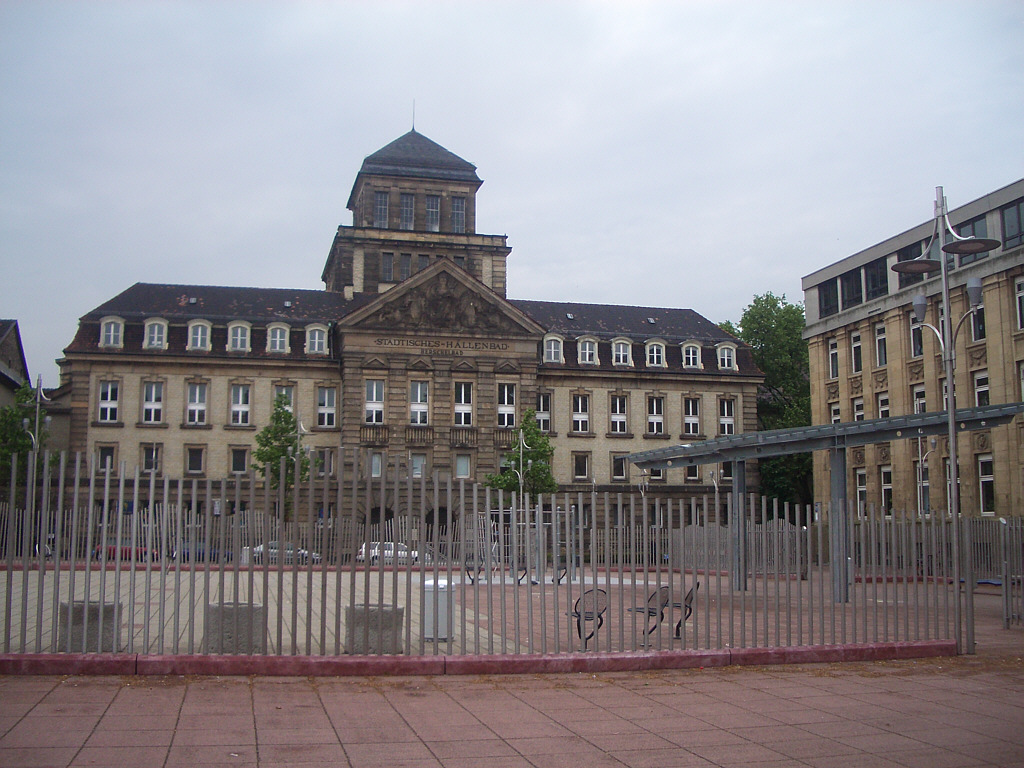 Mannheim, Germany: Herschelbad public baths, U3